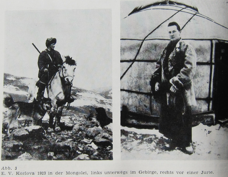 Elizabeth Vladimirovna Kozlova née Pushkariova (19 August 1892 – 10 February 1975) in 1923